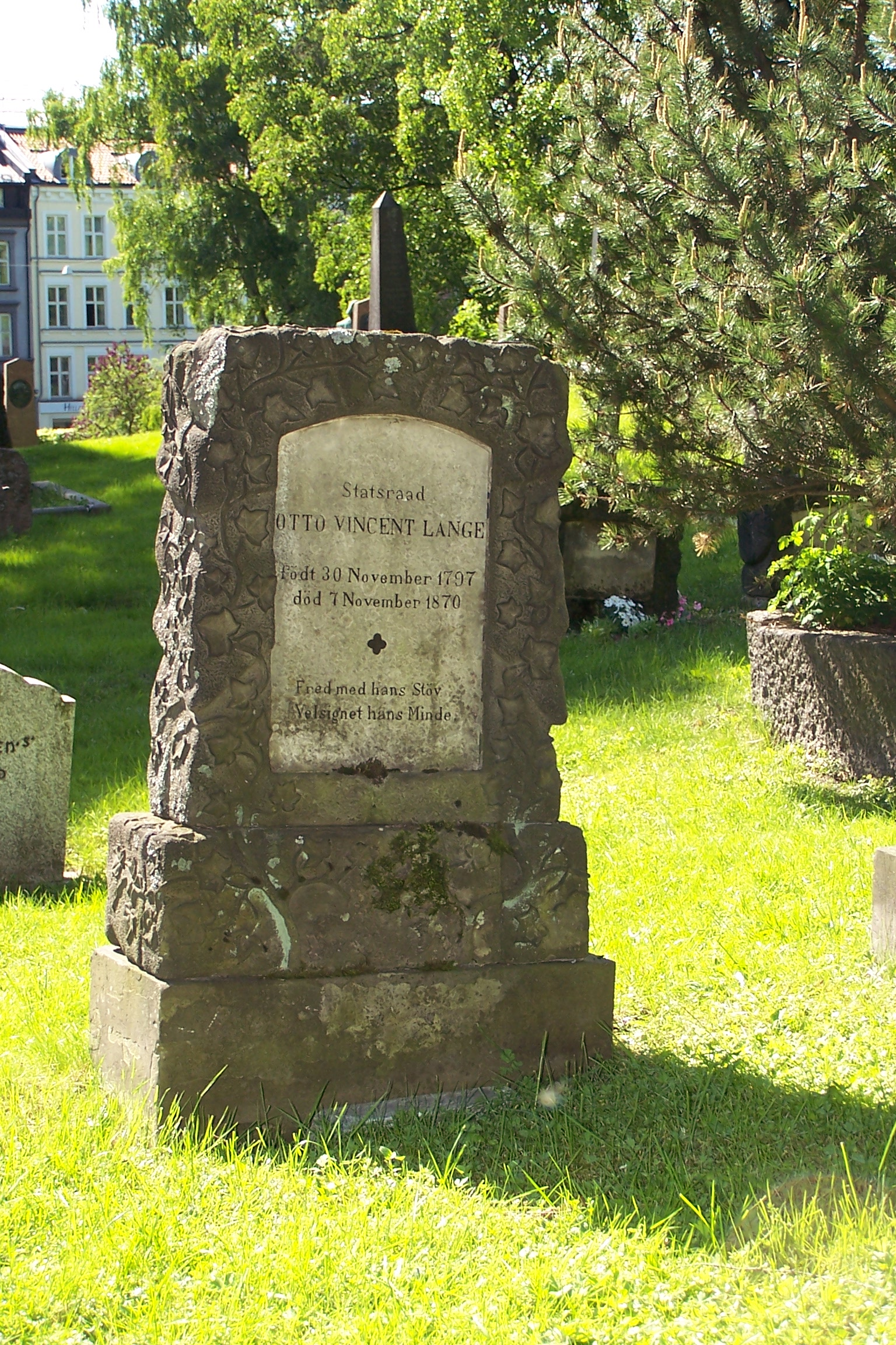 Tomb of Otto Vincent Lange at Vår Frelsers gravlund, Oslo